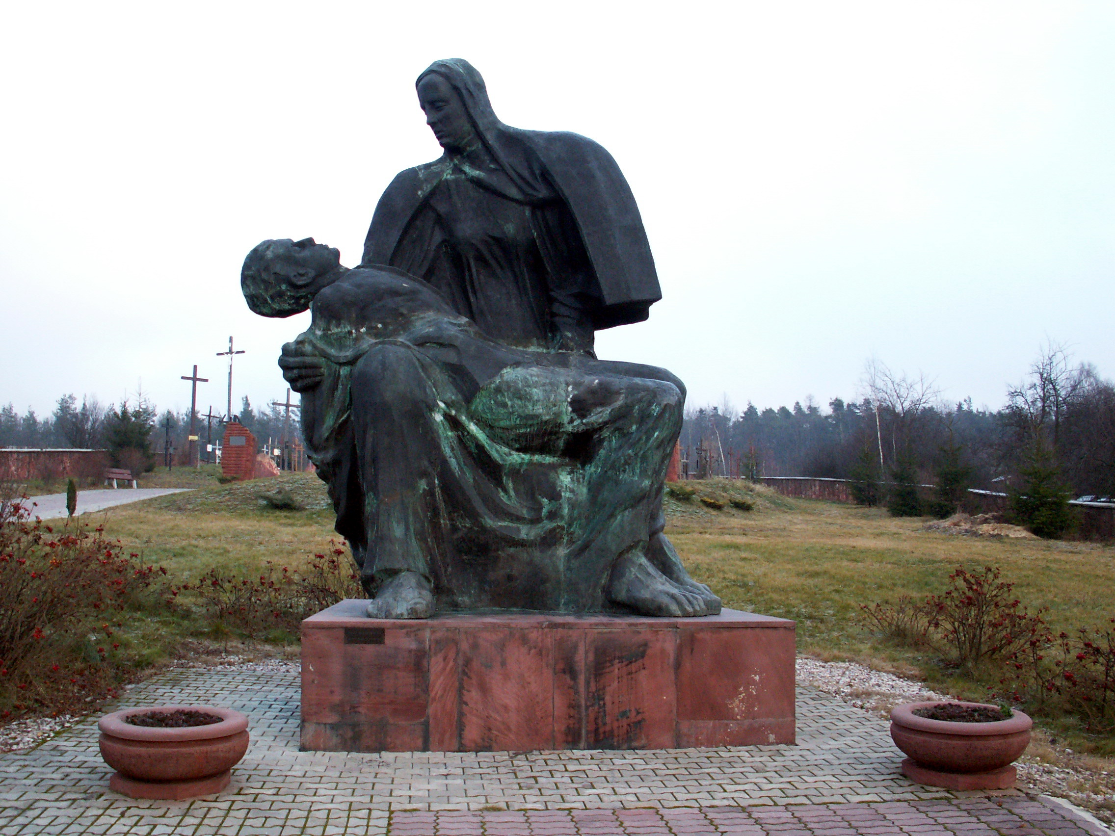 Mausoleum in Michniów, Poland